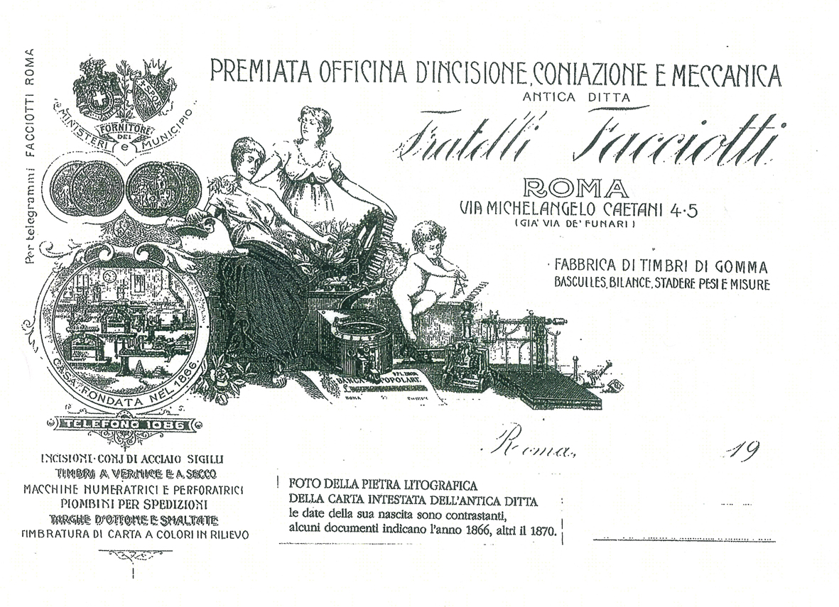 Premiata officina d'incisione dei fratelli Facciotti